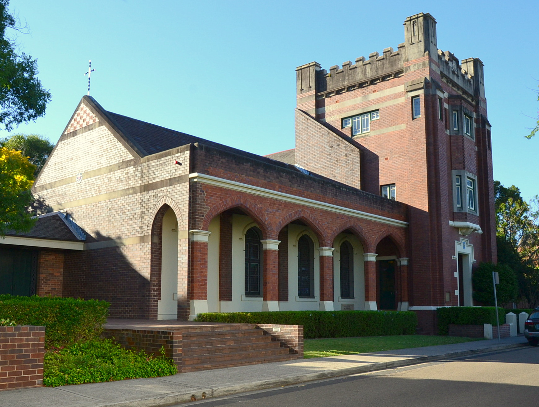 MLC, Burwood, Sydney